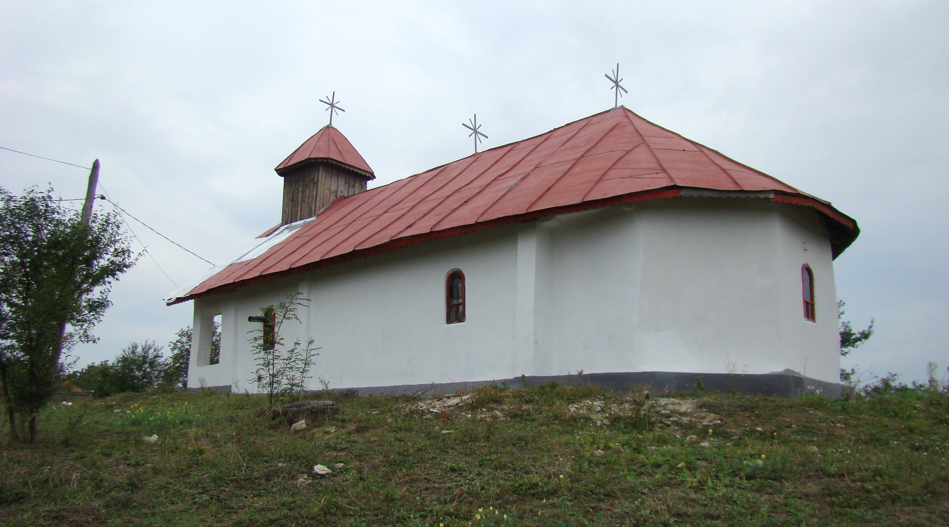 Biserica de lemn „Naşterea Maicii Domnului” din Căzăneşti, comuna Căzăneşti, județul Mehedinți